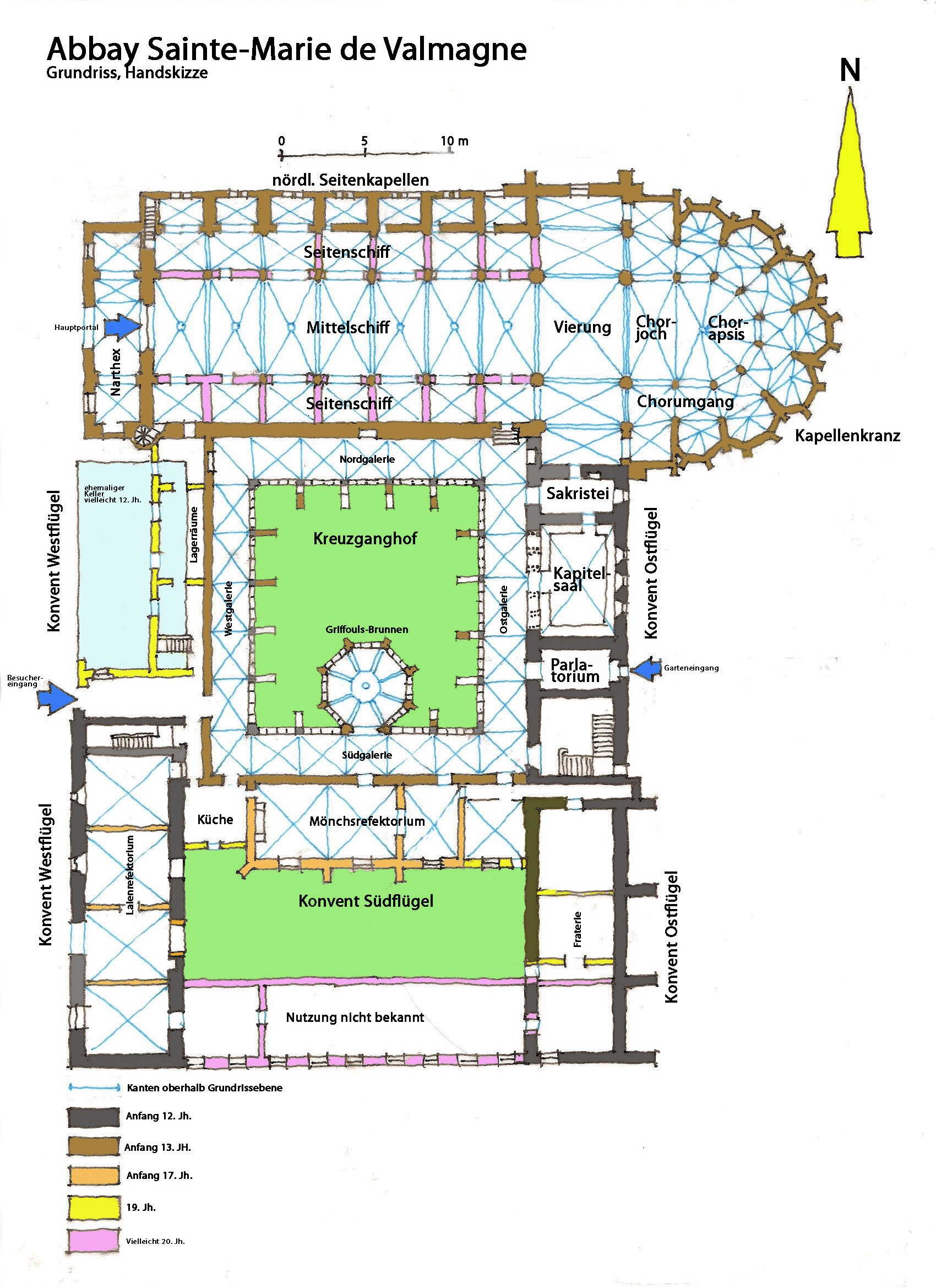 Abbaye de Valmagne, Grundriss, Erdgesch0oss, Handskizze